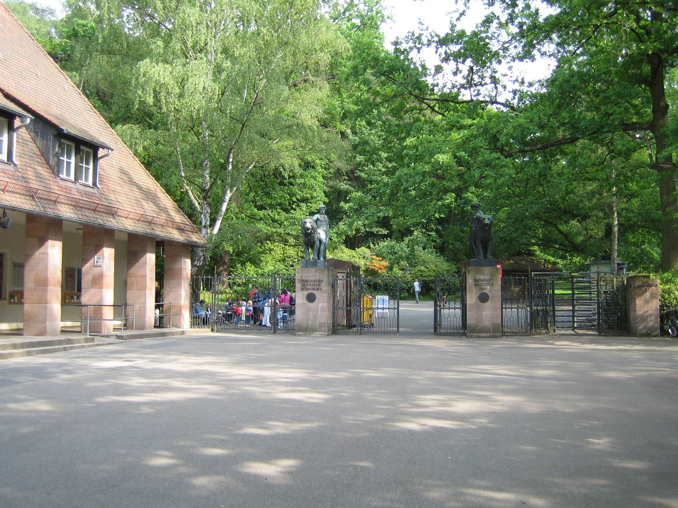 Eingang Tiergarten Nürnberg.